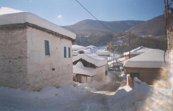 Φυτιά το χειμώνα